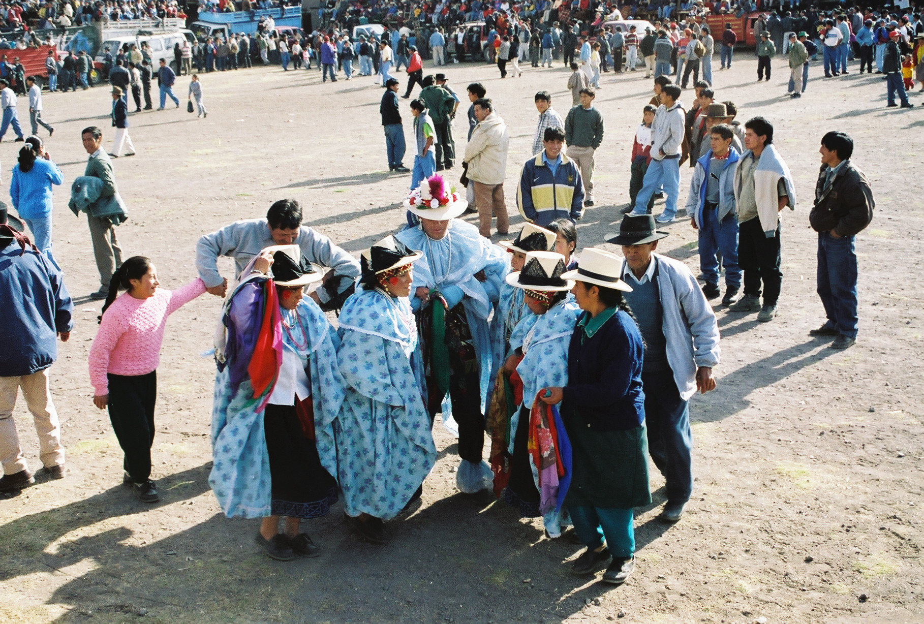 beider Dorffeier im August wird der Kampf des Inka Atahualpa gegen die Spanier nachgespielt, hier der General des Inka mit den Sonnenjungfrauen beim Einzug.August 2000 von Uta Freund